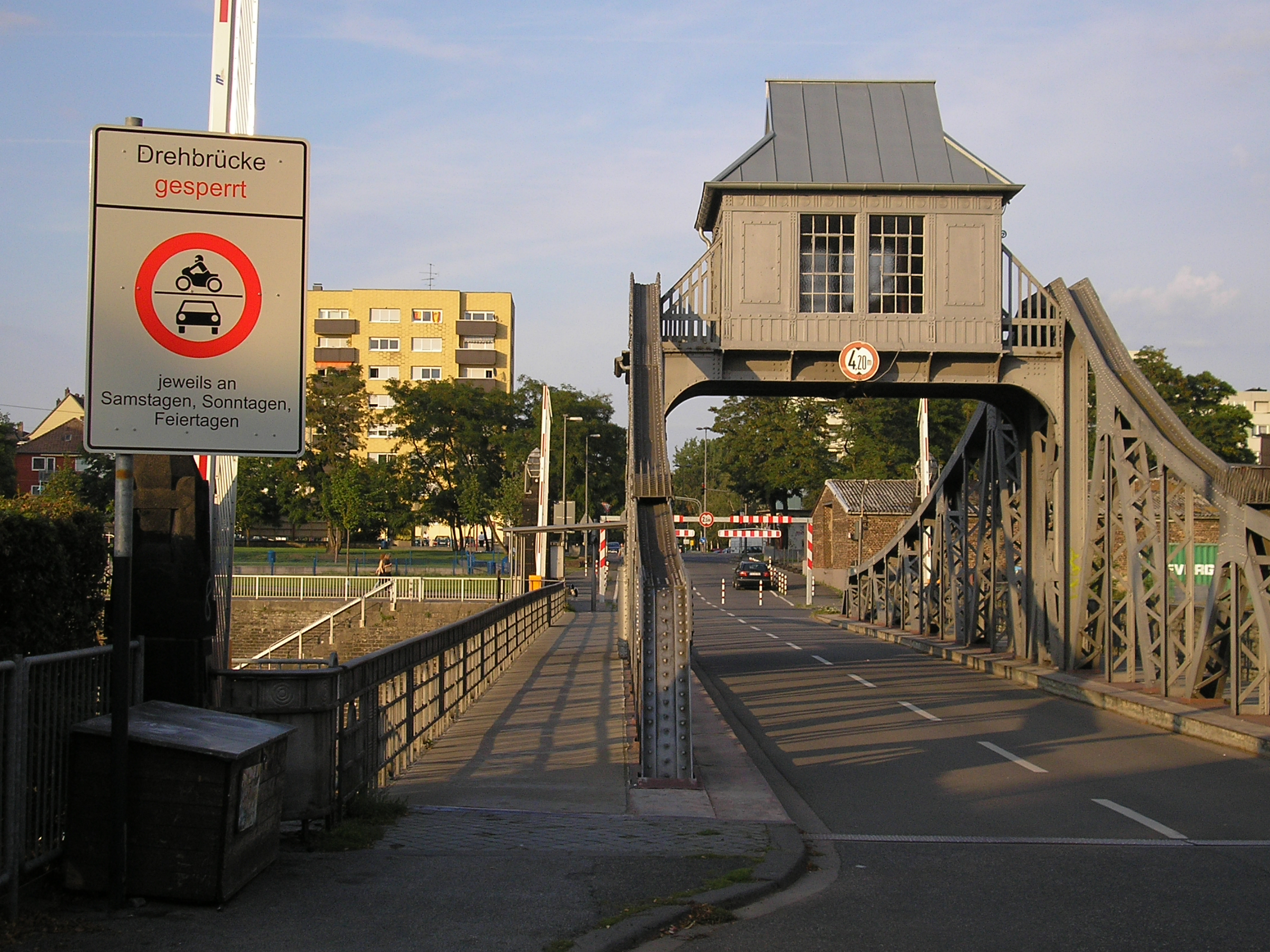 Wochenendsperrung der Drehbrücke in Köln-Deutz